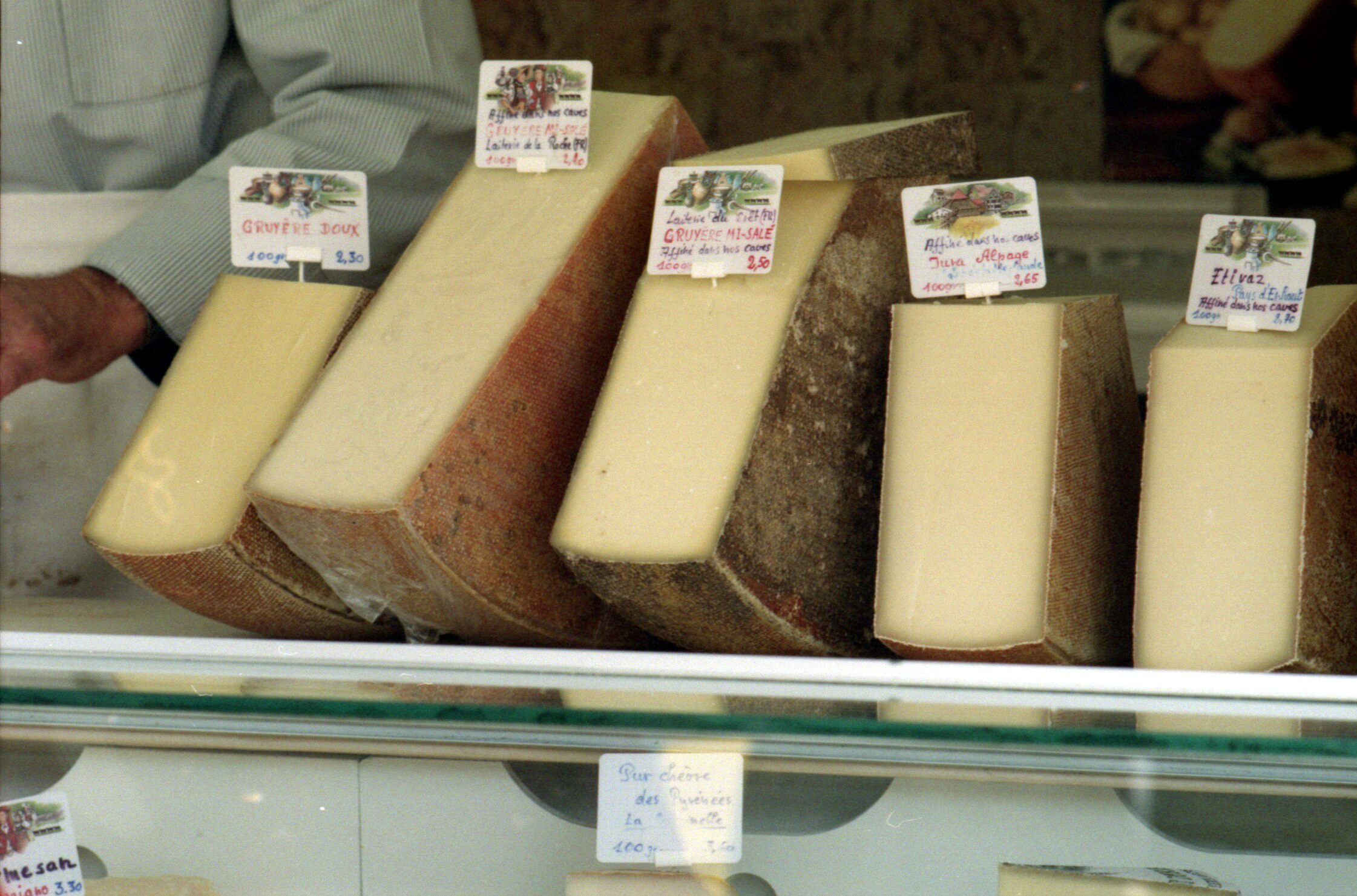 Different types of Gruyère, Jura Alpage and Etivaz cheeses at a flea market in Lausanne, Switzerland. Les célèbres fromages de Christian Willen, affineur depuis plus de 50 ans